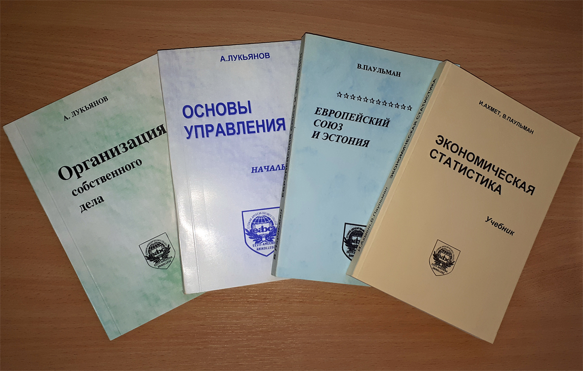 Учебники, изданные Эстоно-Американской бизнес-академией (до 2006 года Эстоно-Американский бизнес-колледж)